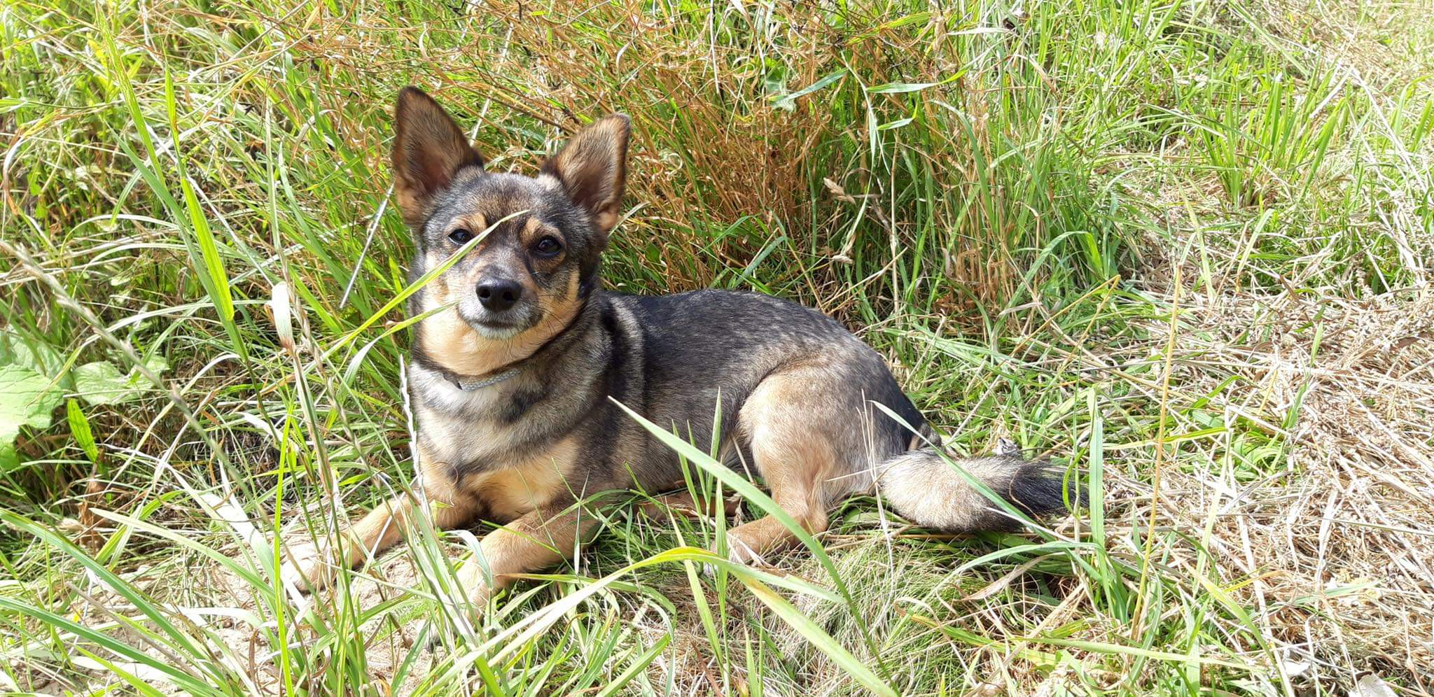 Przedstawiciel gatunku pies domowy, wielorasowy.